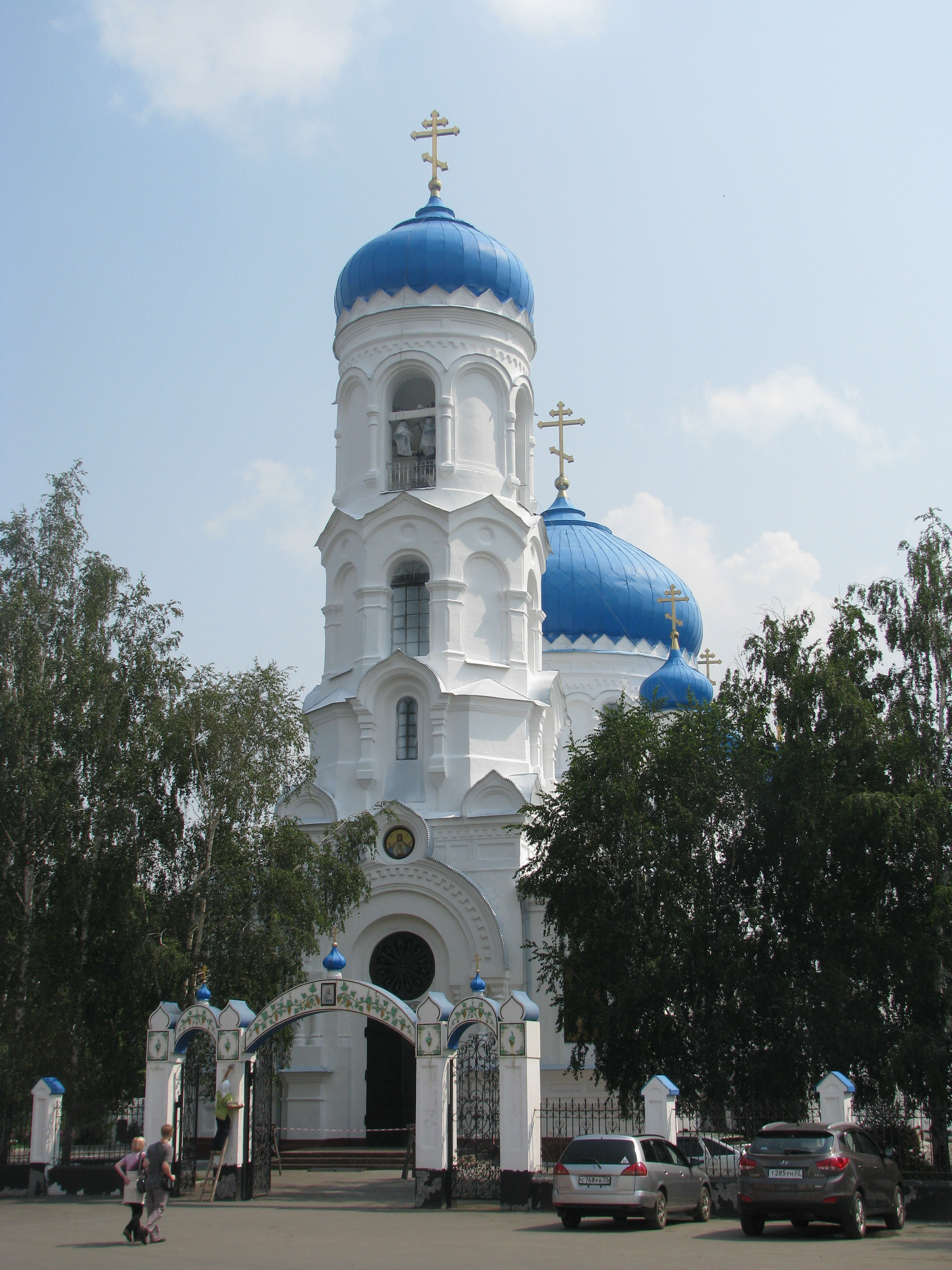 Успенский кафедральный собор, г. Бийск Алтайского края, Россия